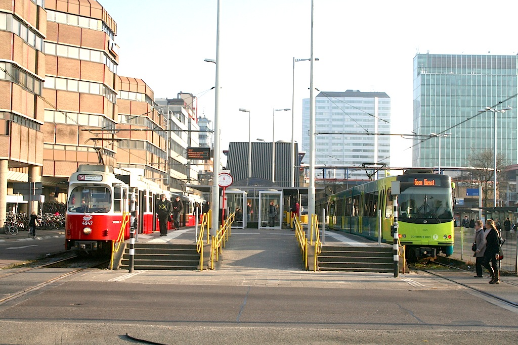 Weense en Zwitserse trams van de Sneltram Utrecht te Utrecht; 3 maart 2011. Foto: Erik Swierstra.